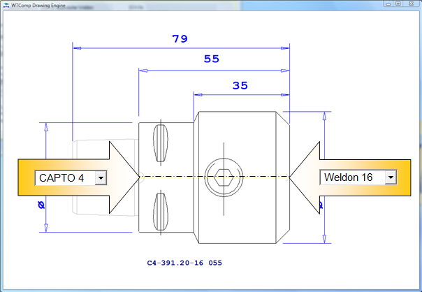 Fuegebedingungen bei Werkzeugen